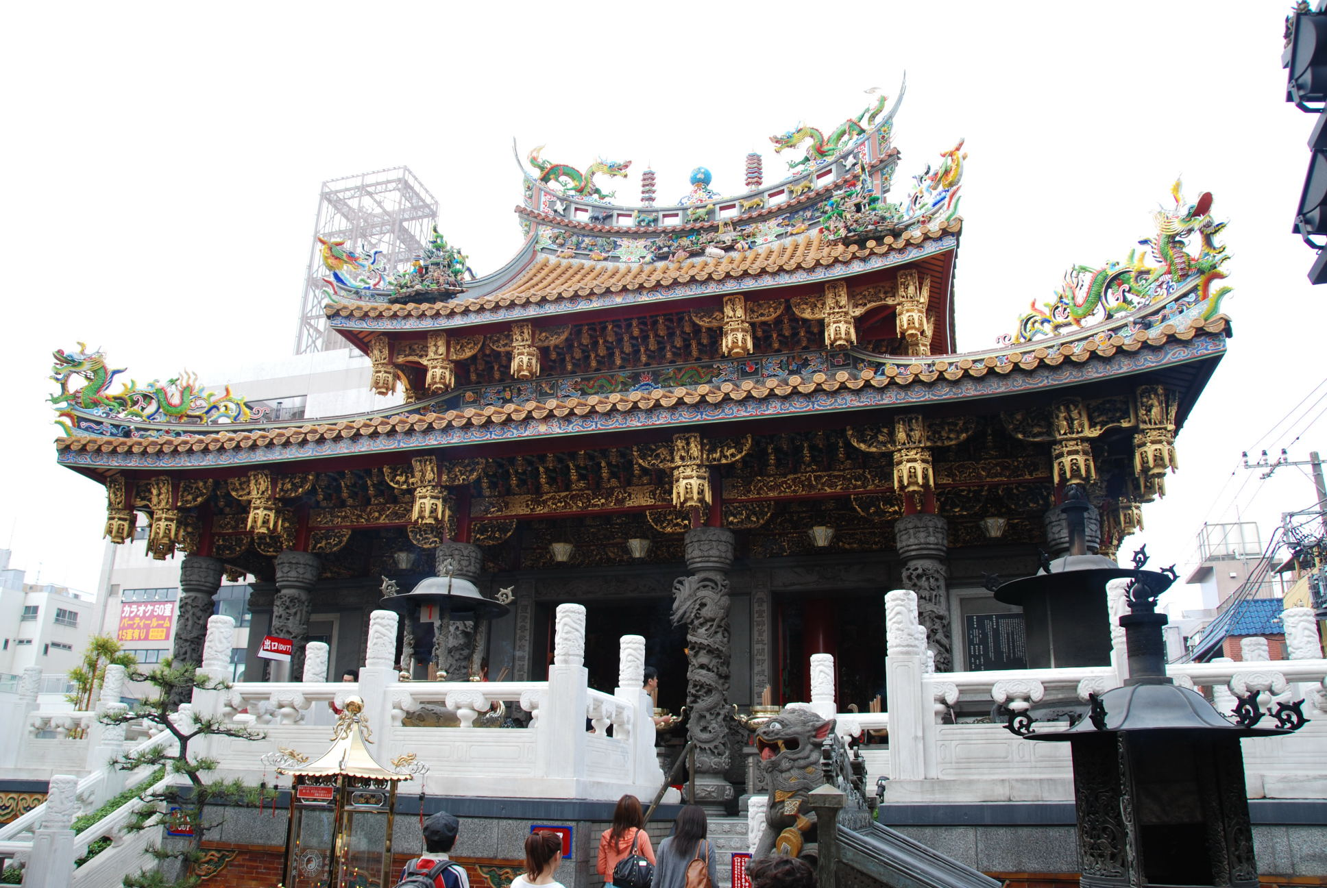 Yamashitacho, Naka Ward, Yokohama, Kanagawa Prefecture 231-0023, Japan